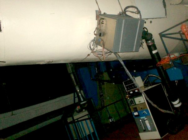 En el area del telecospio Stock en las instalaciones del Observatorio Astronómico Nacional de Llano del Hato, Merida - Venezuela